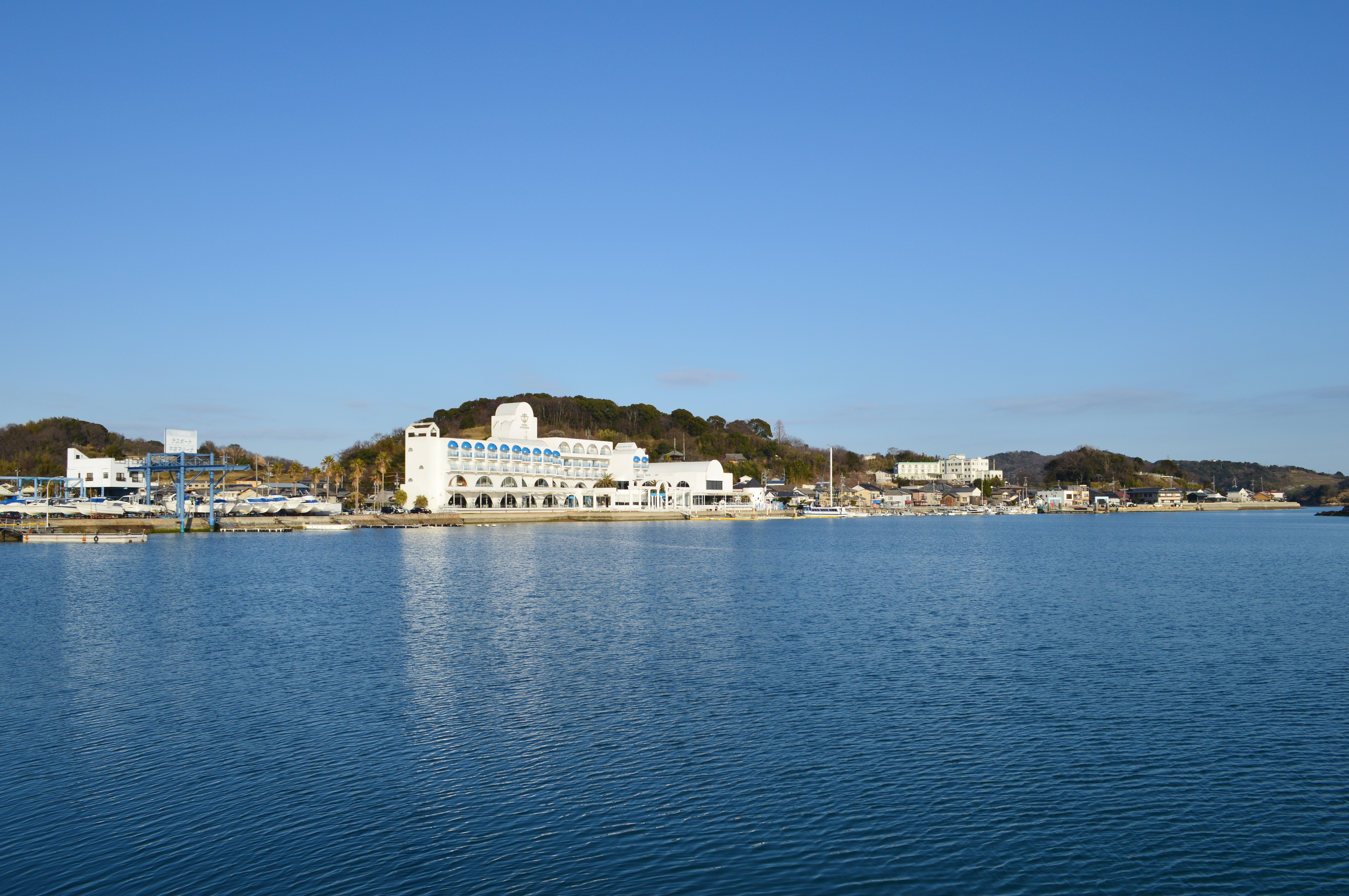 牛窓港 概観